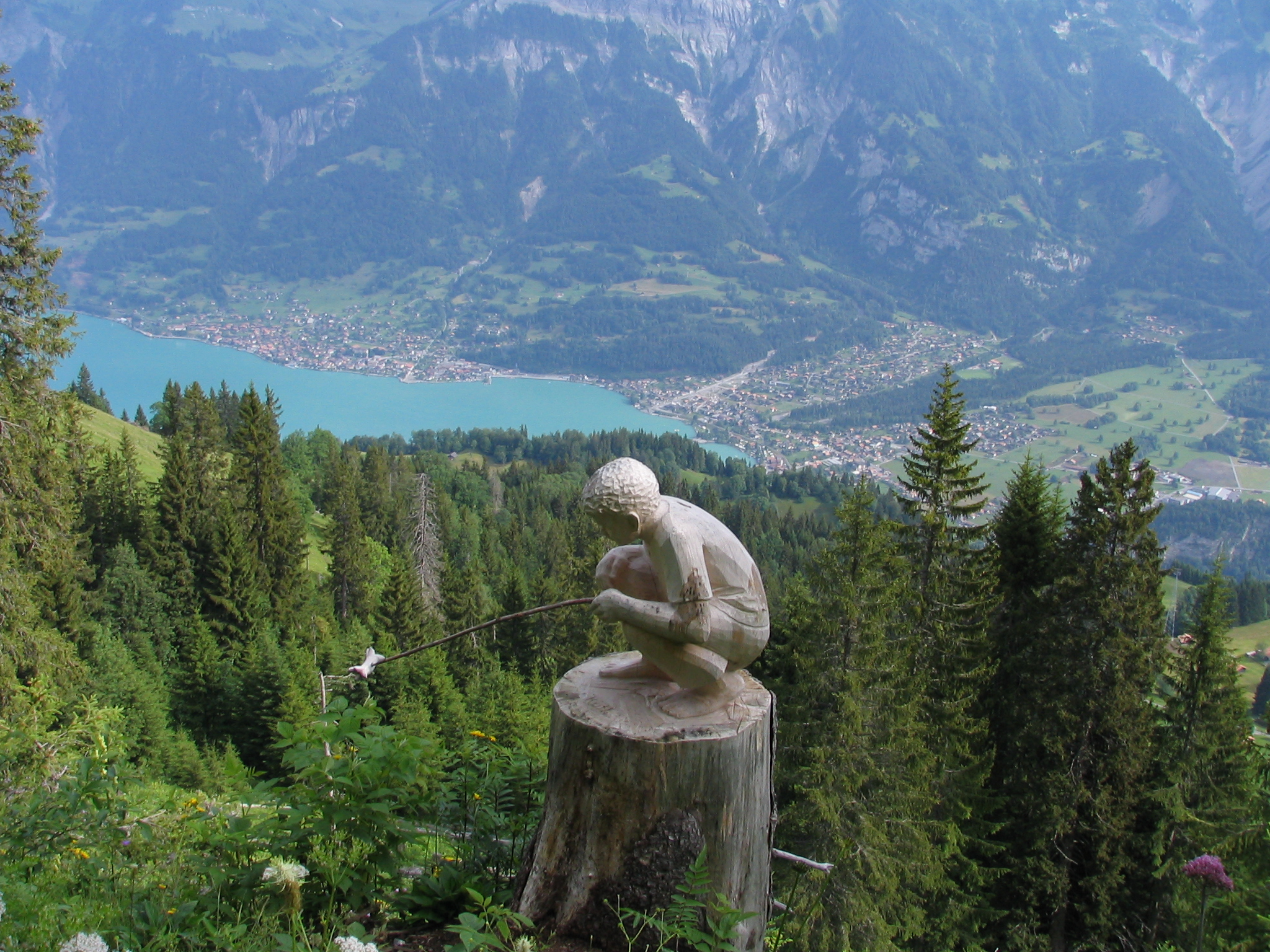 Geschnitzte Figur eines Knaben am Schnitzlerweg auf der Axalp. Im Hintergrund Brienz (Kanton Bern, Schweiz). Schnitzerei: Werk von Ruth Fischer, 2004. Information von